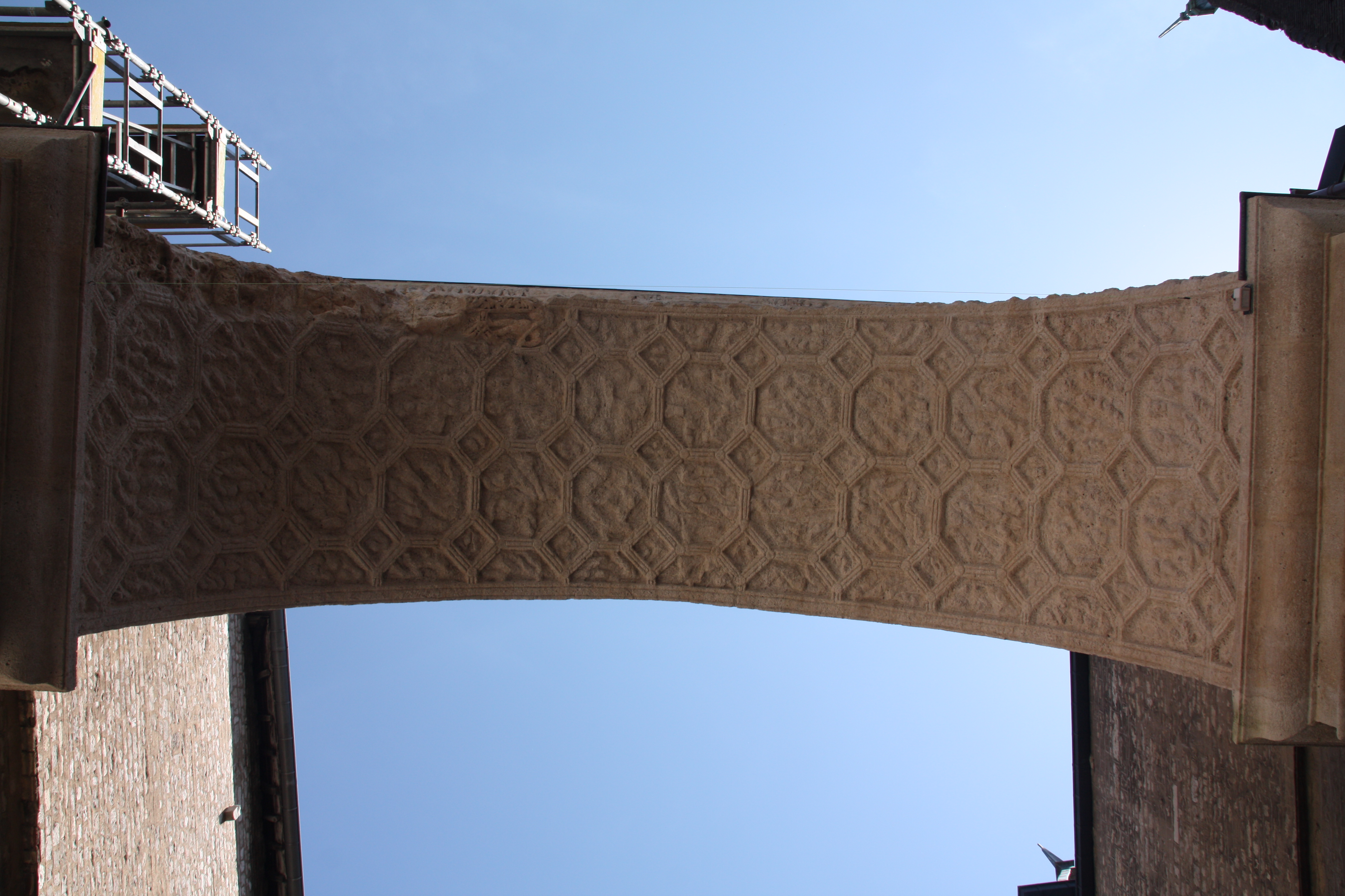 Porte Noire à Besançon.